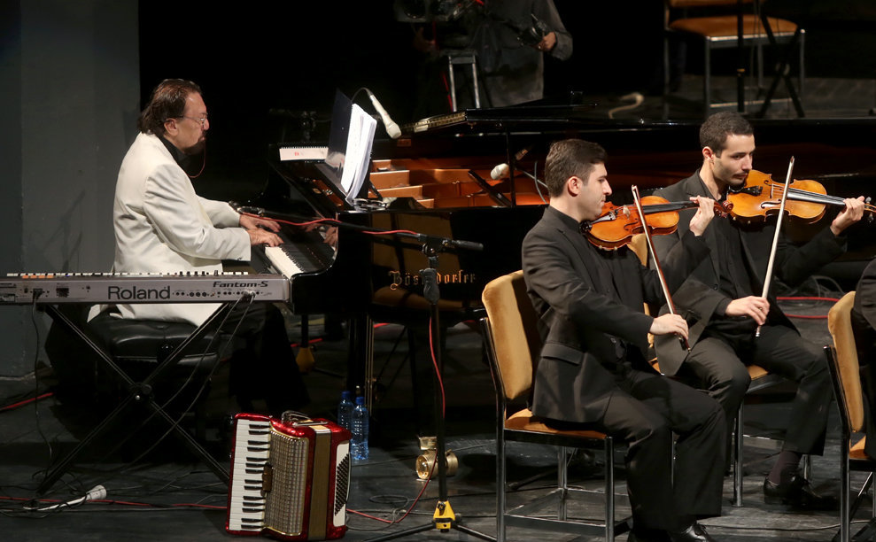 کنسرت موسیقی باران عشق، آثار ناصر چشم آذر یکشنبه ۲۰ مهر ۱۳۹۴ در تالار وحدت برگزار شد.